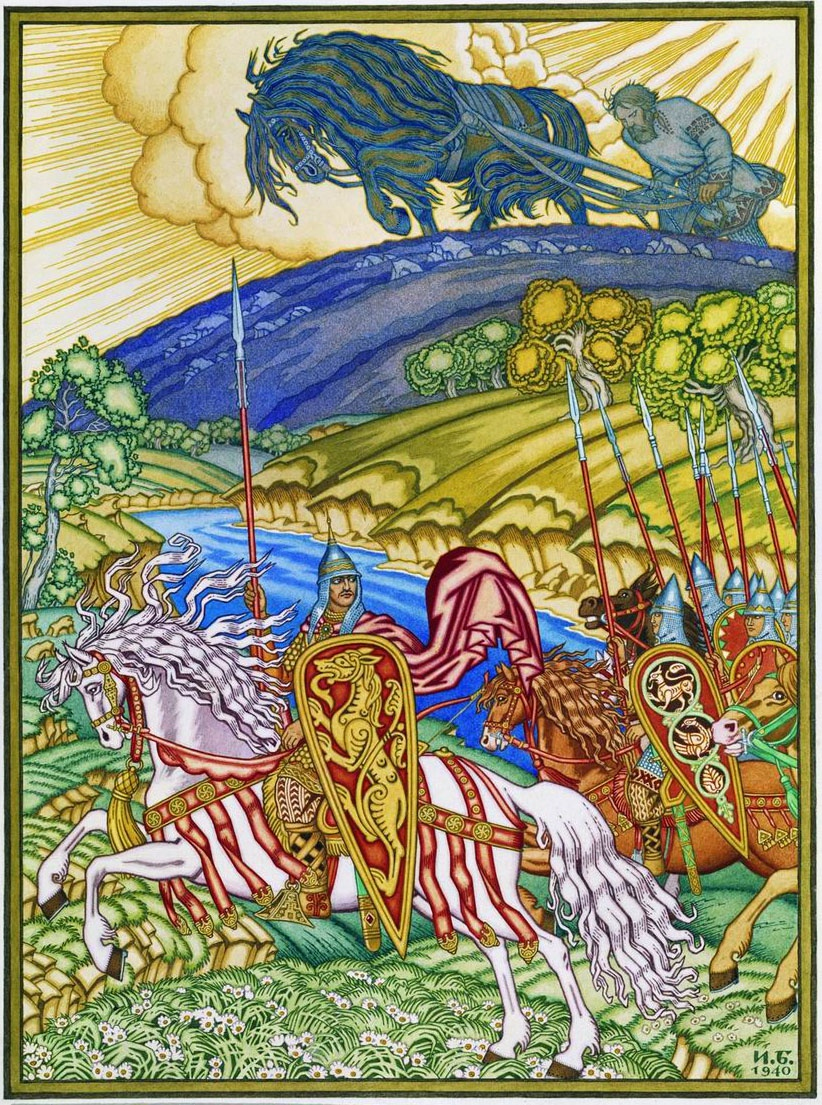 Bogatyr Volga and Mikula Selaninovits. From russian bylina Вольга и Микула. Эскиз иллюстрации к сборнику былин для книги Н.В. Водовозова «Слово о стольном Киеве и о русских богатырях». 1940. ГРМ